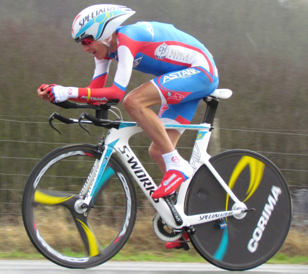 Brajkovic paris nice 2012